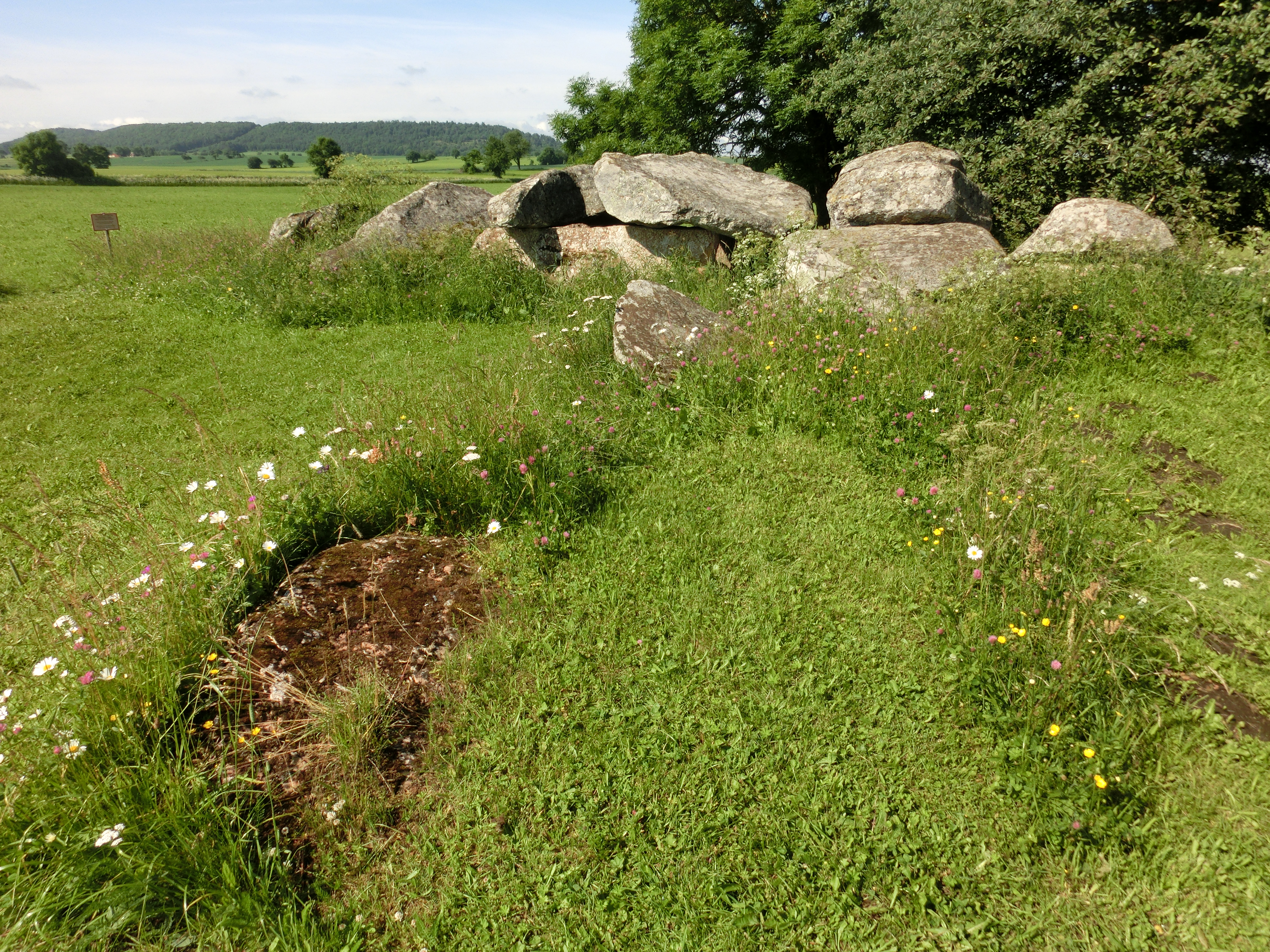 Gånggriften Ragnvalds grav (RAÄ-nr Karleby 58:1) i radbyn Karleby Långa, Karleby socken, Ållebergs fjärding uti Vartofta härad, Falköpings kommun, f.d. Skaraborgs län, Västergötland, Västra Götalands län, Sverige. I bakgrunden till vänster ses platåberget Ålleberg.